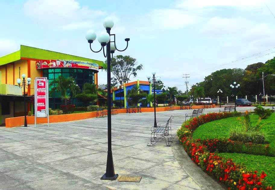 Casa de la cultura